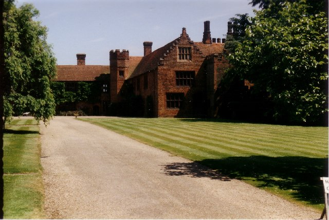 Ingatestone Hall